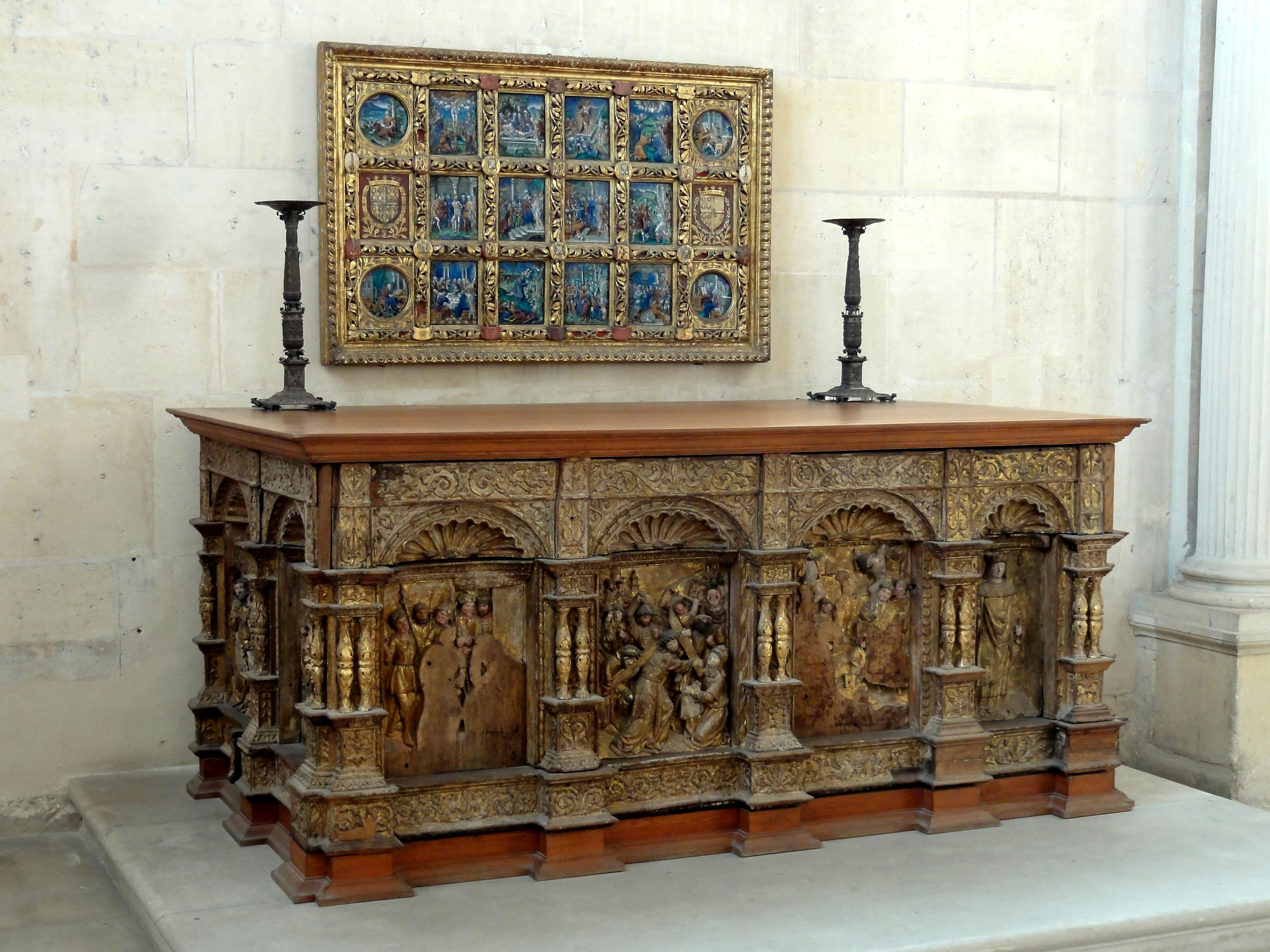 Autel en bois doré de 1524, provenant de la Sainte-Chapelle.